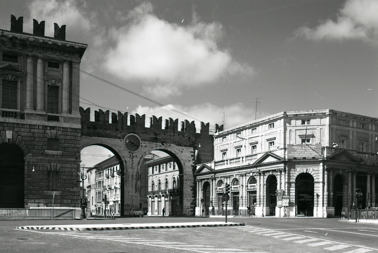 Servizio fotografico : Verona, 1972 / Paolo Monti. - Strisce: 7, Fotogrammi complessivi: 36 : Negativo b/n, gelatina bromuro d'argento/ pellicola ; 35 mm. - ((Sul portanegativi: NIKMAT PanF. - Occasione: Documentazione per la pubblicazione: Brugnoli Pier Paolo, "Nella bella Verona", Bologna, Cappelli, 1972. - Fonte: Agenda di Paolo Monti: Leica 1501-3000 Controllo numerazione (1950-1978), presso Archivio Paolo Monti. - Fonte: Monografia di Brugnoli, Pier Paolo: Nella bella Verona, Bologna, Cappelli (1972). - Fonte: Fattura di Paolo Monti: IV. Commesse/ Fattura/ Fotografie per illustrazione del volume Verona (1972/12/20), presso Archivio Paolo Monti. N. 292 riprese fotografiche della città di Verona in formato 24x30